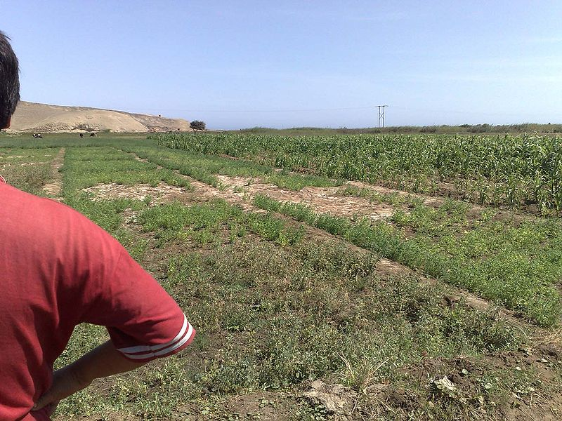 Zoute geïrrigeerde grond